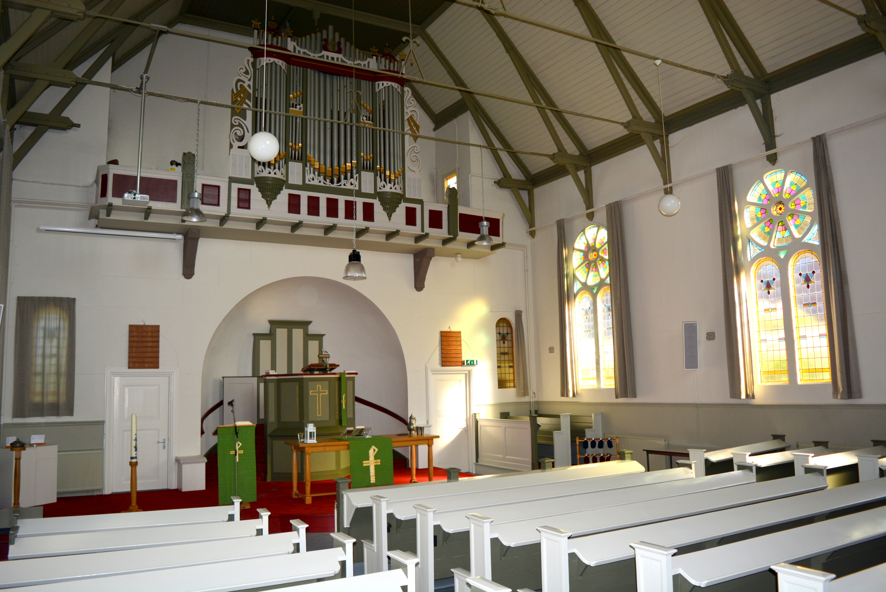 De Tynje, Grifformearde tsjerke, oersjoch ynterieur